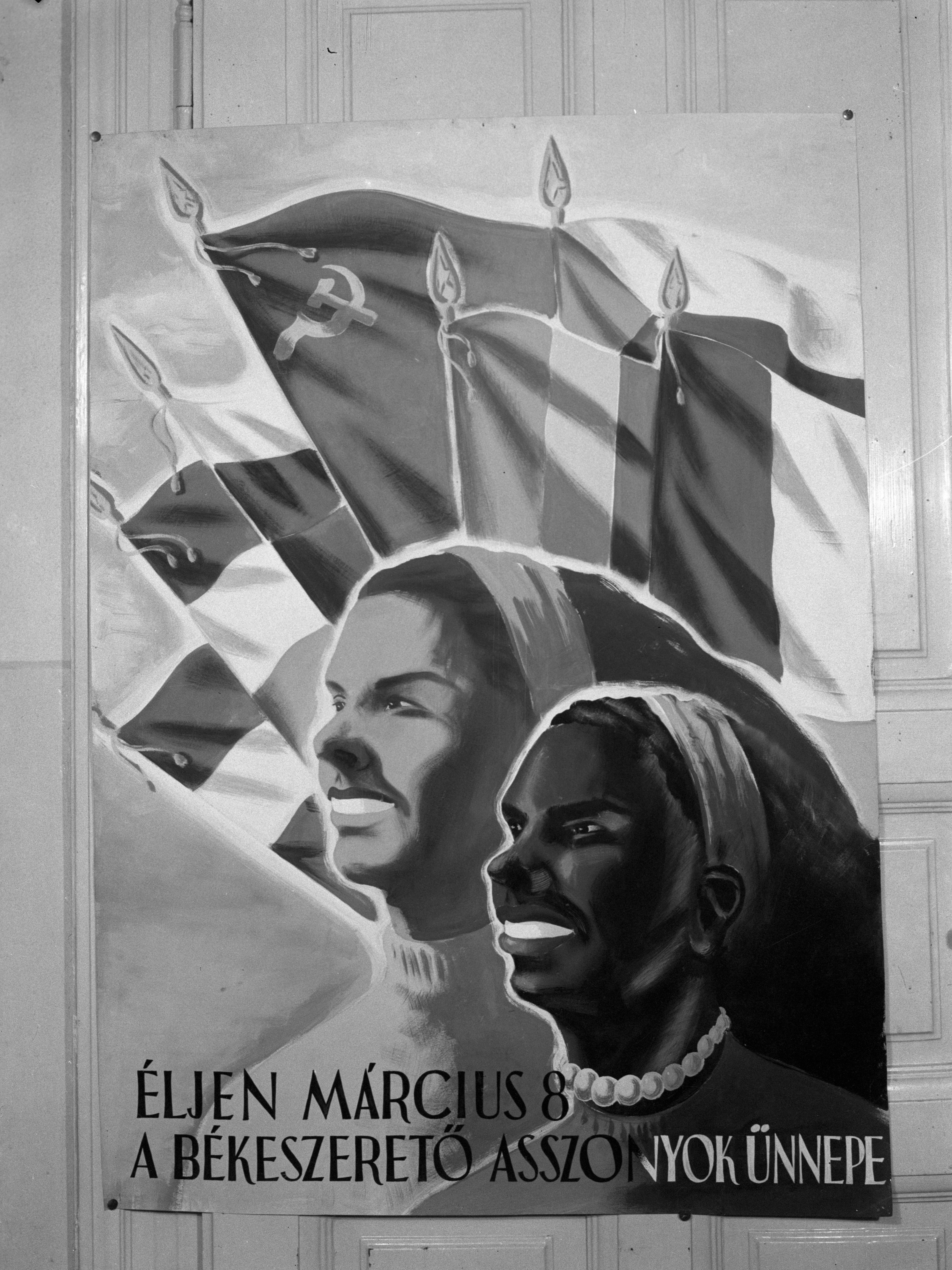 Tags: poster, women's day